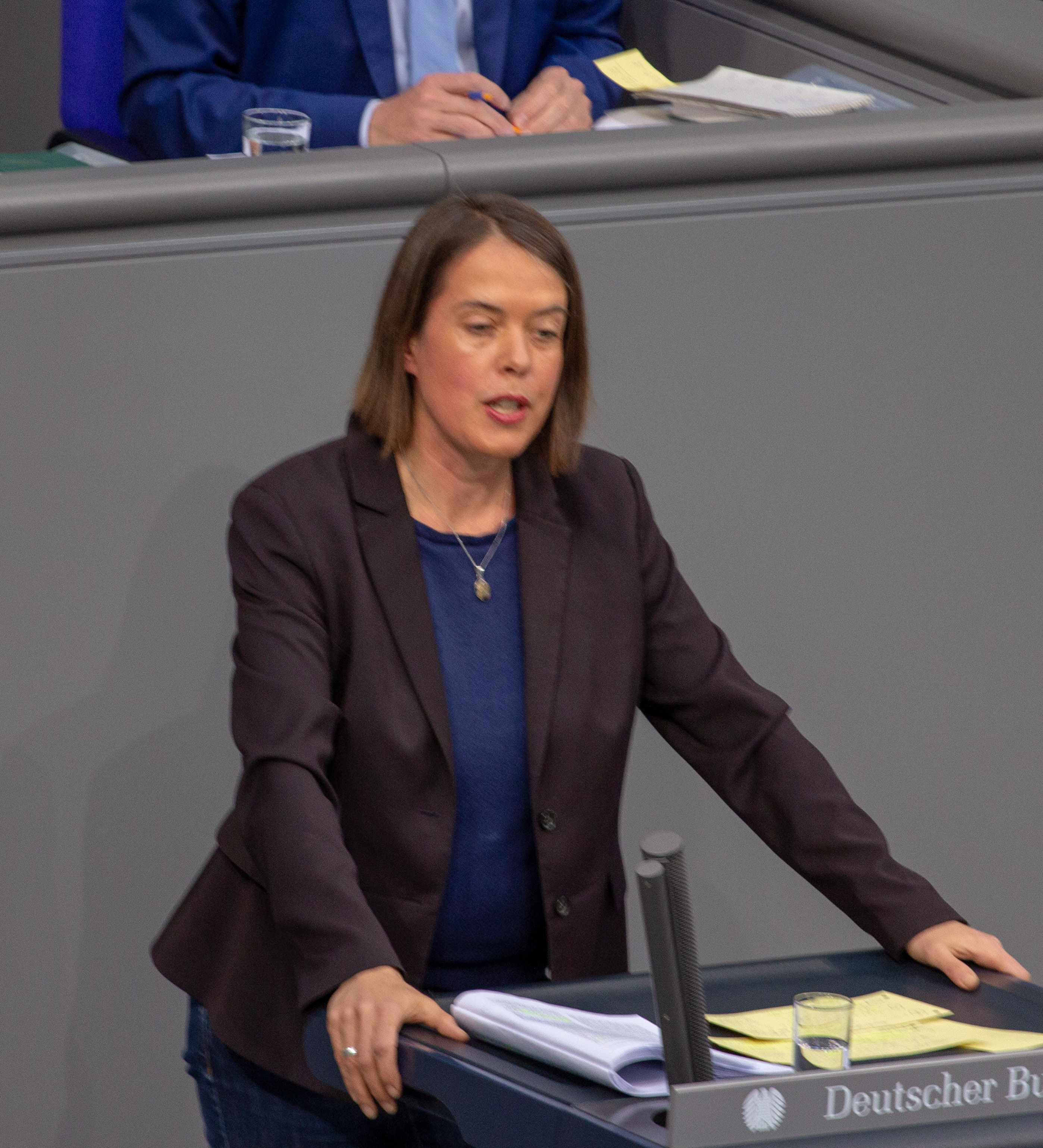 Christine Buchholz, Mitglied des Deutschen Bundestages, während einer Plenarsitzung am 11. April 2019 in Berlin.